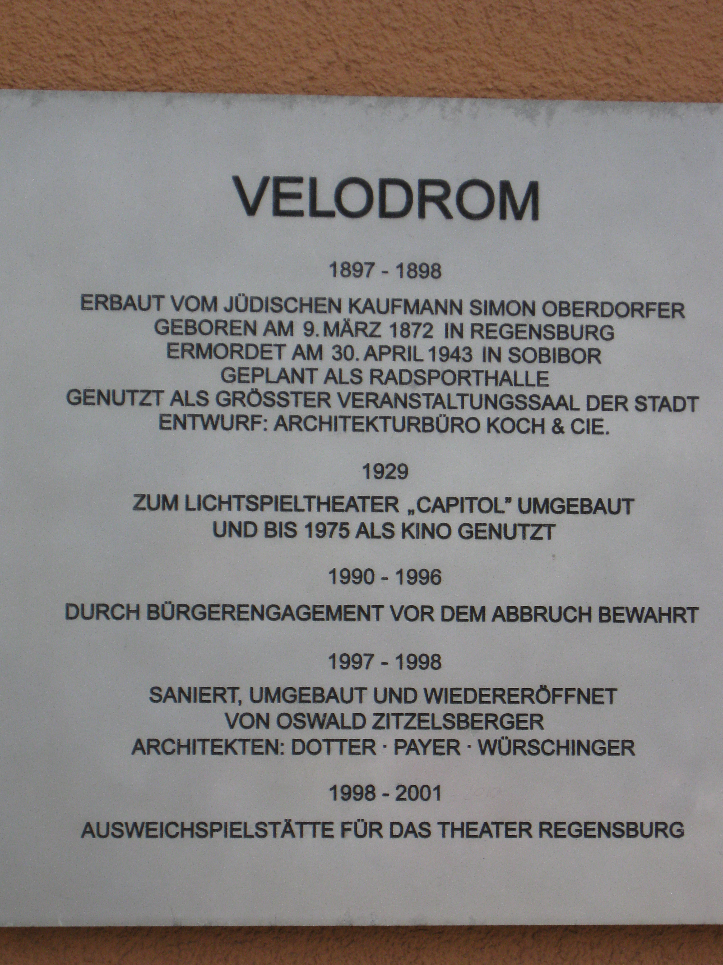 Regensburg